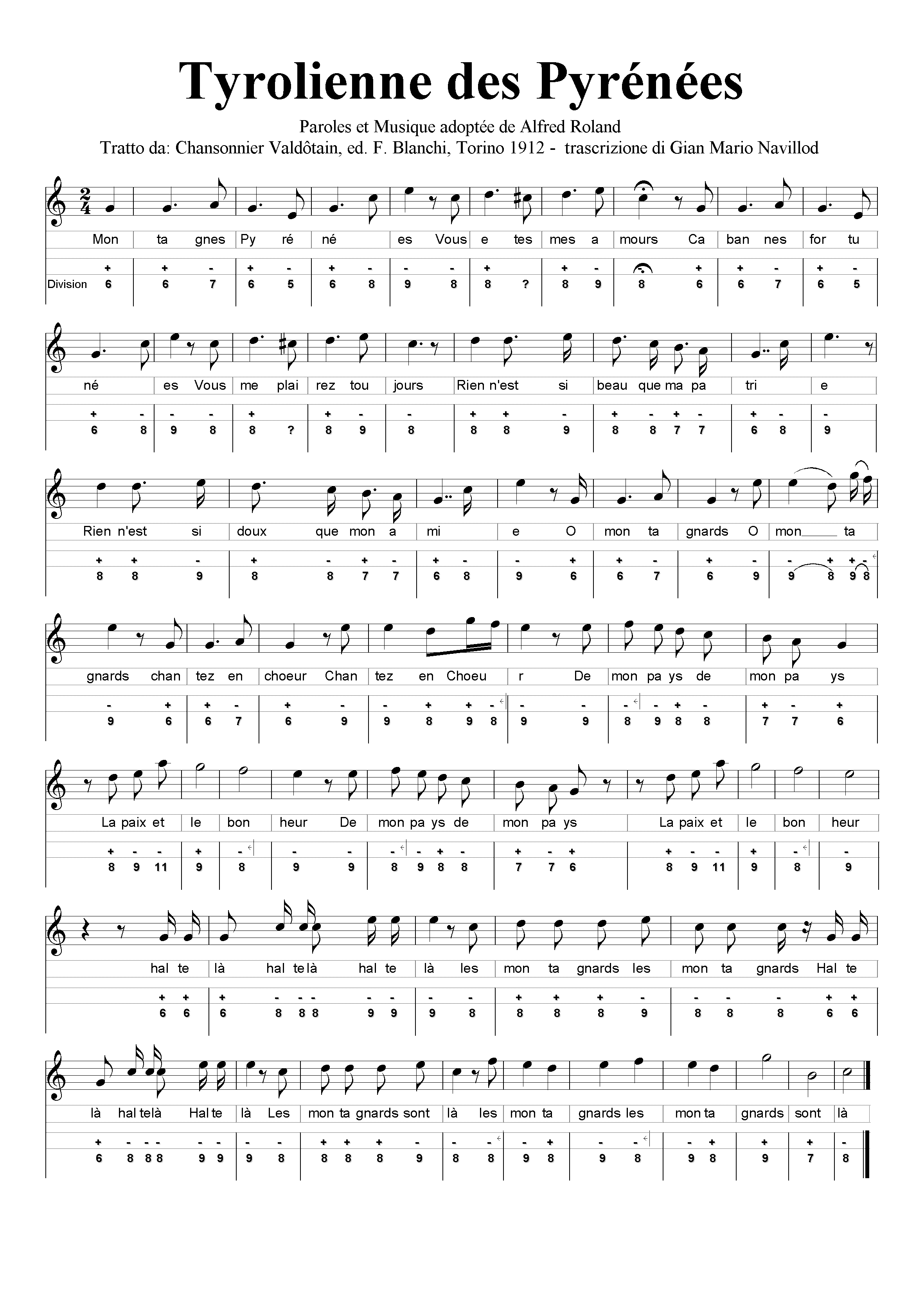 Montagnes valdotaines